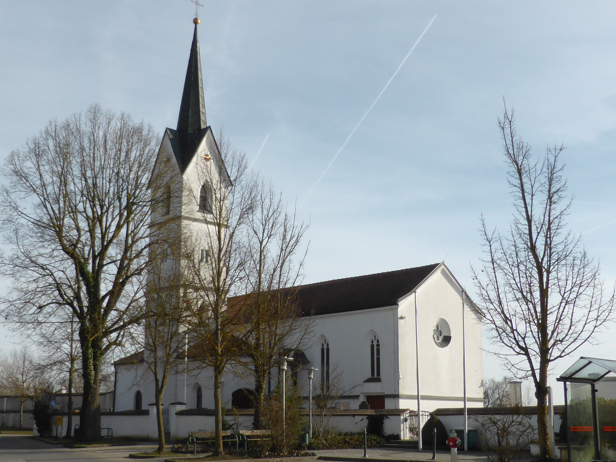 Filialkirche "St. Martin" in Reibersdorf, Gemeinde Parkstetten, Landkreis Straubing-Bogen. Aufnahme von 2016